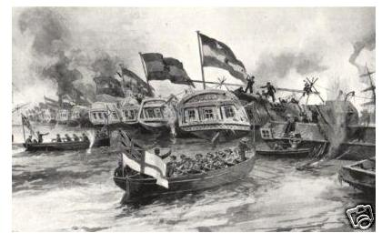 Vuelta de Obligado (20 de nov. de 1845) Corte de las cadenas por parte del Firebrand Imágen de impresión británica de 1897 (Gentileza de "Colorado del Monte")